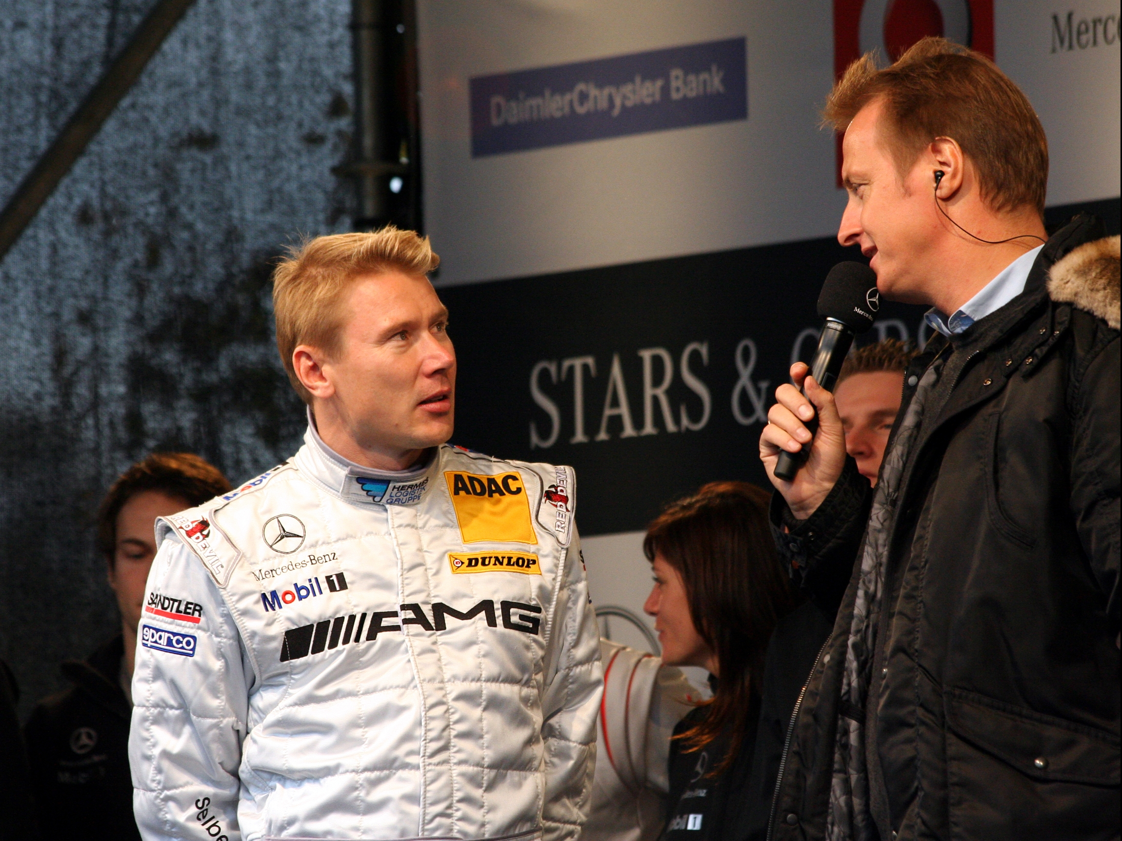 Mika Häkkinen and Florian König at Stars and Cars 2007. Mika Häkkinen announces the end of his DTM career.